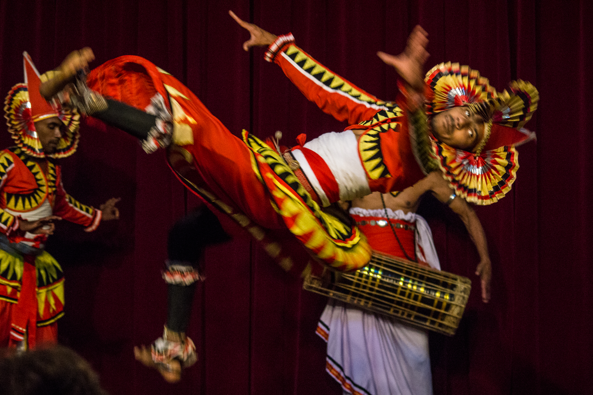 in Kandy, Sri Lanka